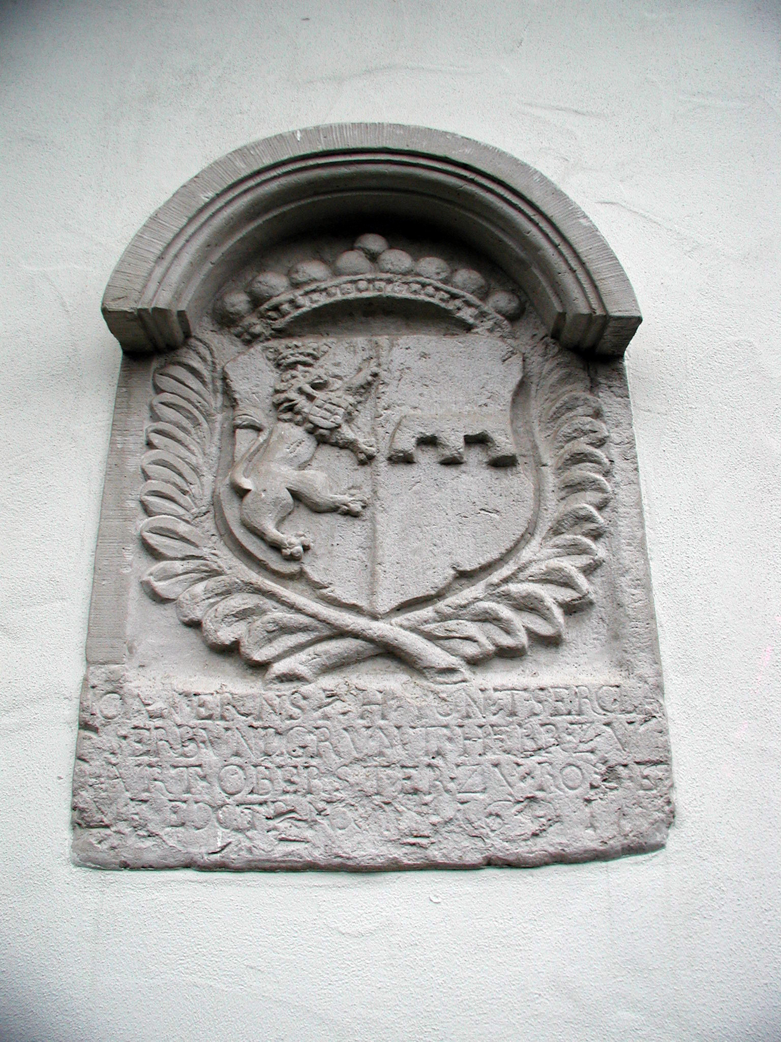 Alt-Hürth, Allianzwappen am alten Pfarrhaus (v. Tzerklaes / v. Harff von 1691). Text: Iioan erns f. l. tzerglas, erb und grunt-HERR zu HURT, OBERSTER ZU ROSS, EXSTRUXIT l69l [1] Paul Clemen: Kunstdenkmäler der Rheinprovinz, Bd 4, S 149